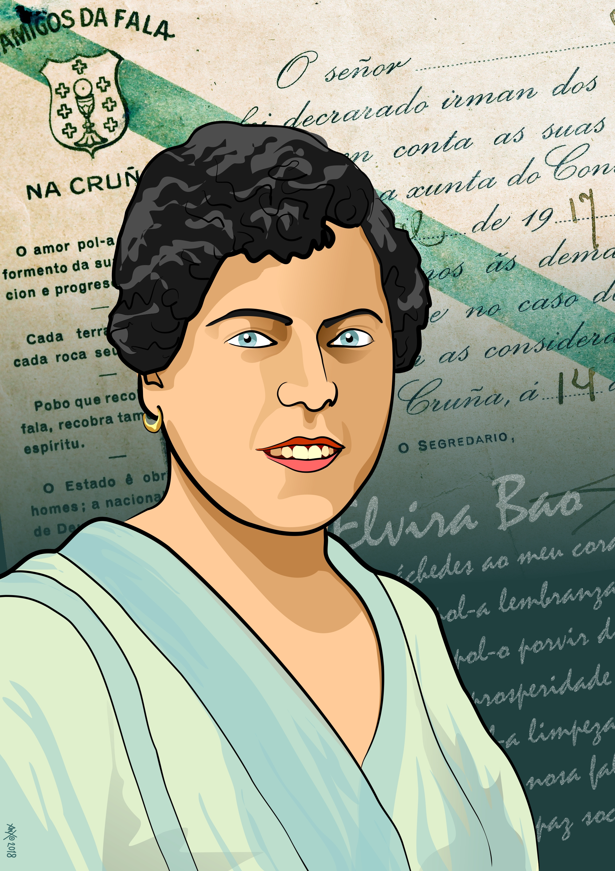 Retrato de Elvira Bao